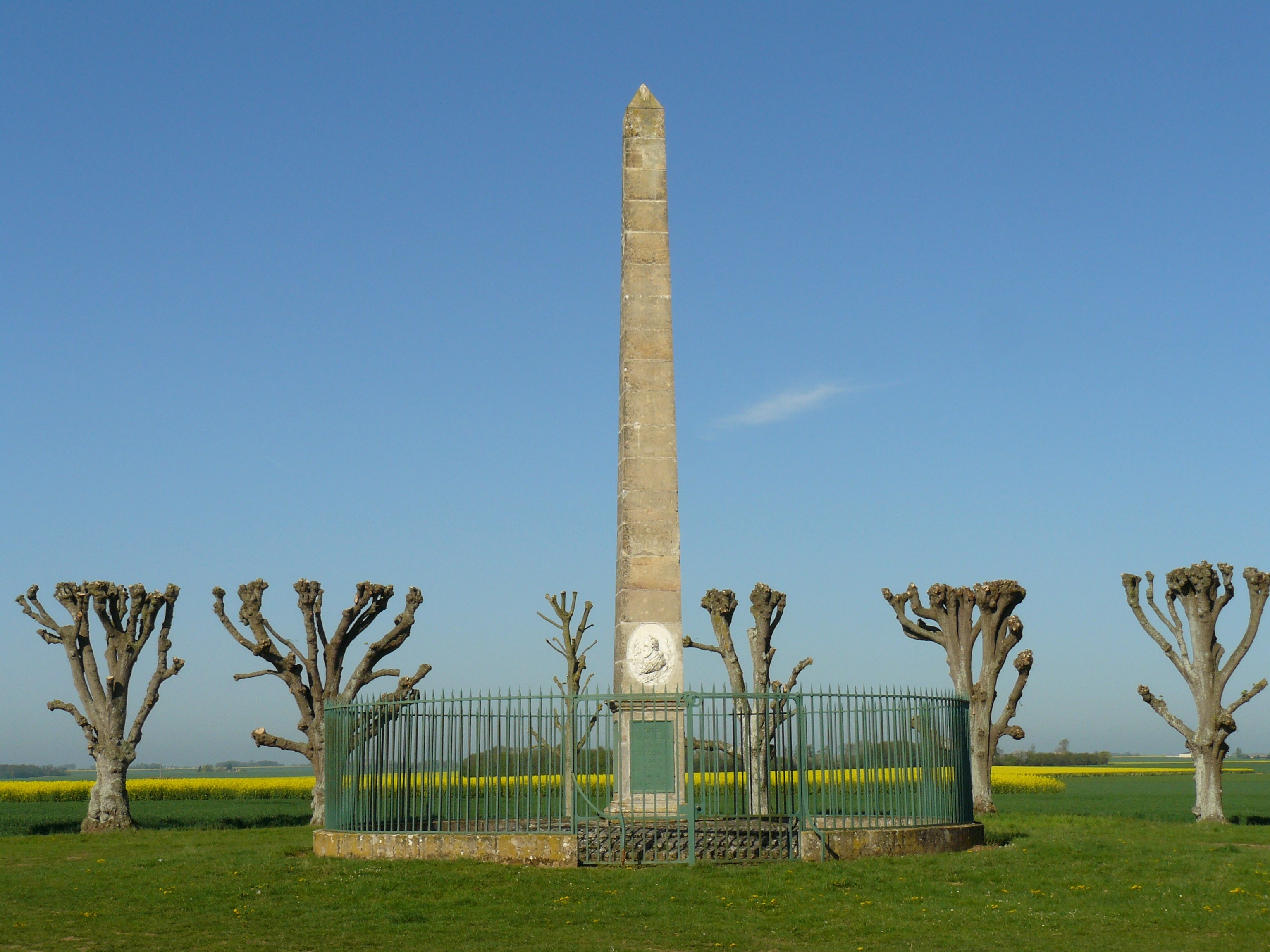 "Pyramide" (obélisque, 1804) commémorative de la bataille d'Ivry (1590) à Epieds (Eure, France)